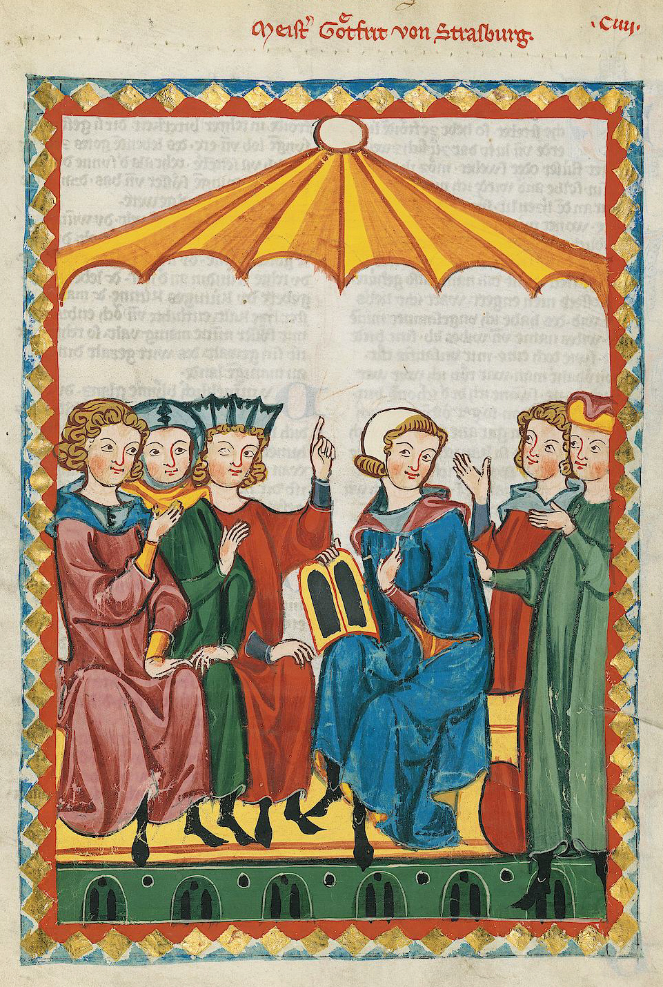 Codex Manesse, UB Heidelberg, Cod. Pal. germ. 848, fol. 364r, Meister Gottfried von Straßburg